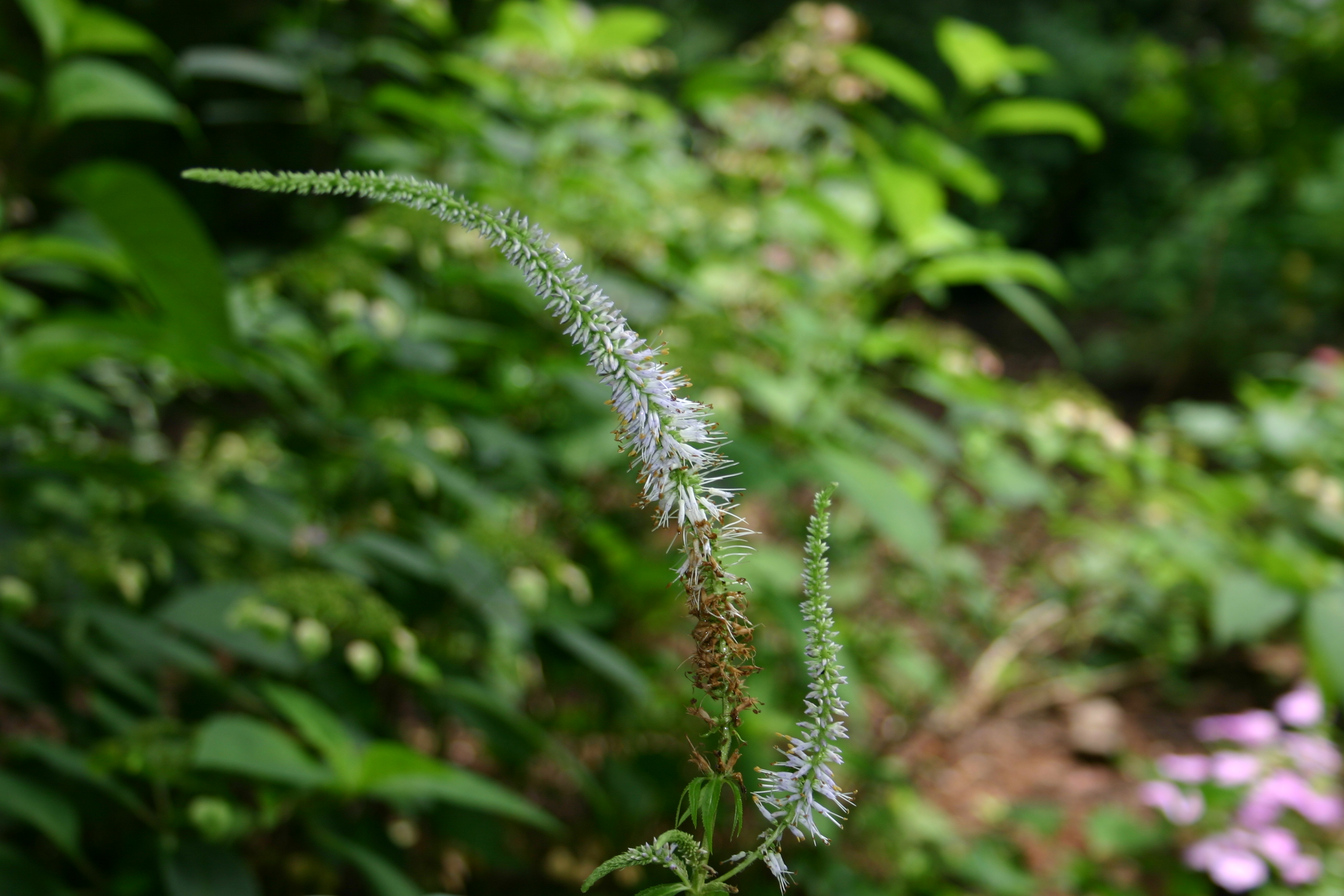 Veronicastrum sibiricum